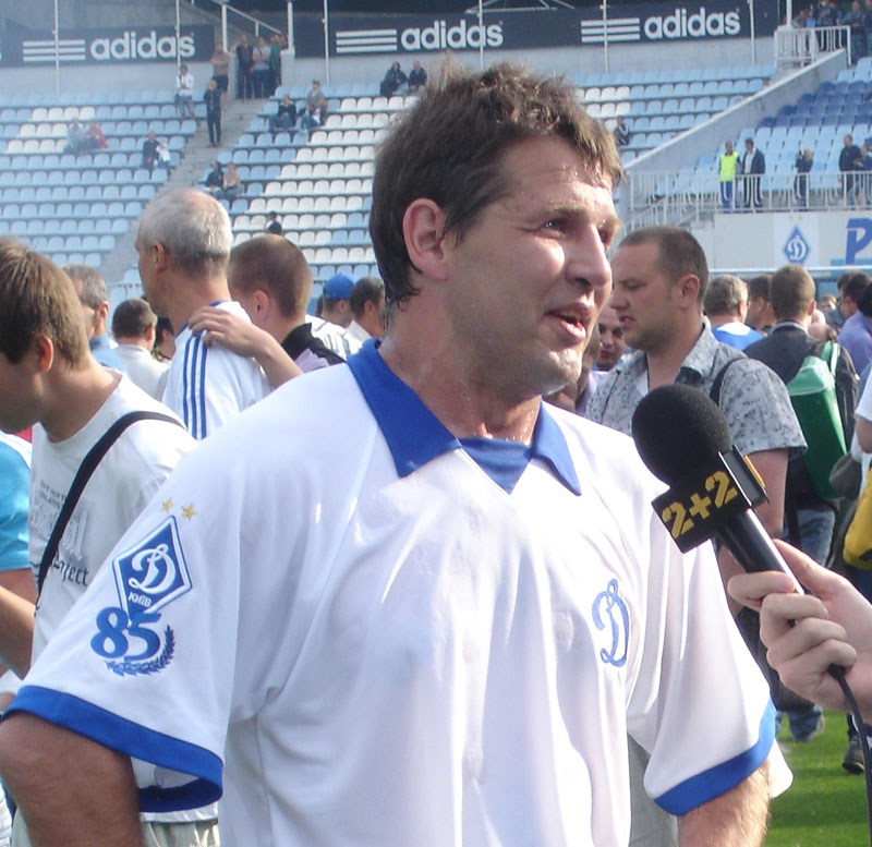 Саленко Олег Анатольевич, 2012